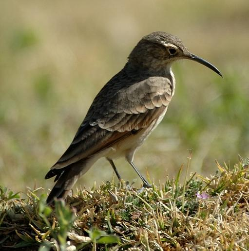 Slender-billed Miner (Geositta tenuirostris). Chiguata, Arequipa, Peru 17.06.08